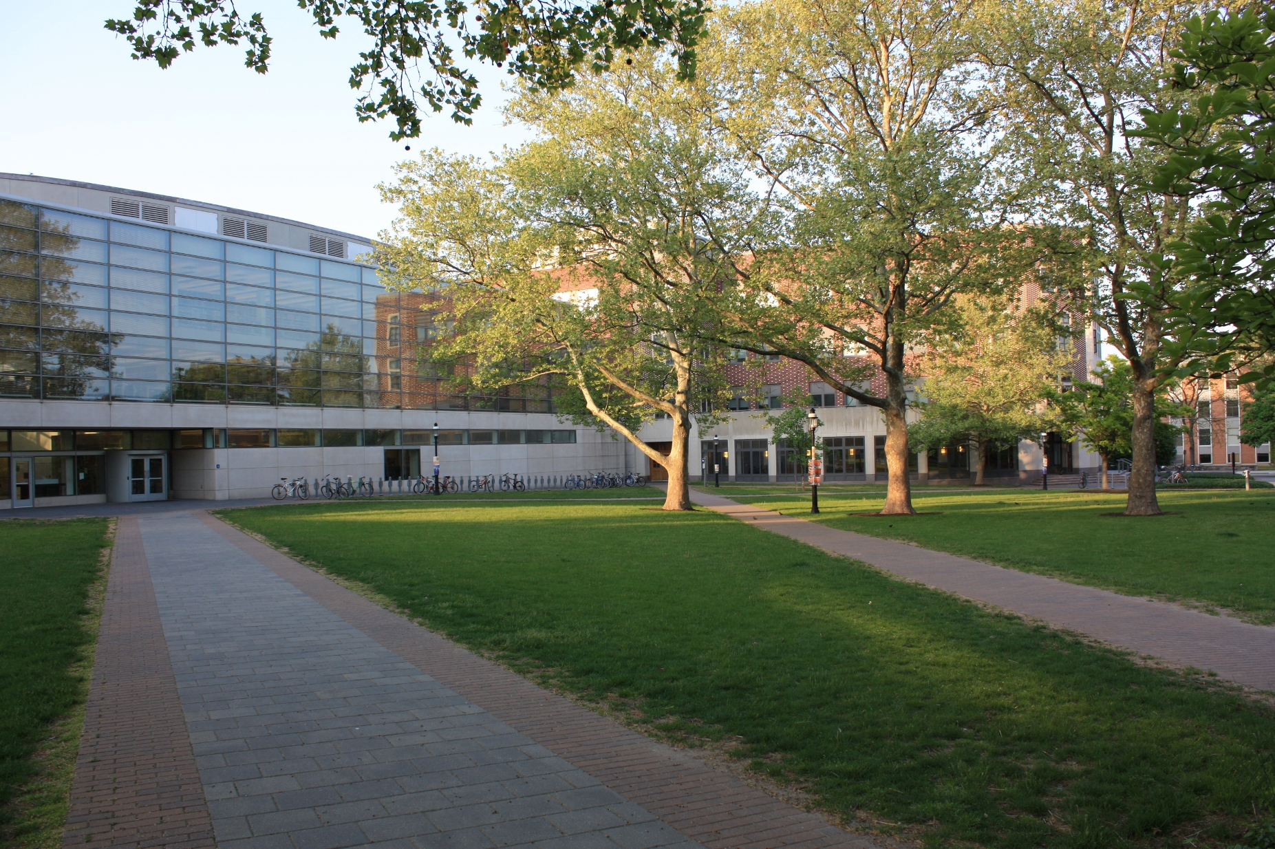 Friend Center